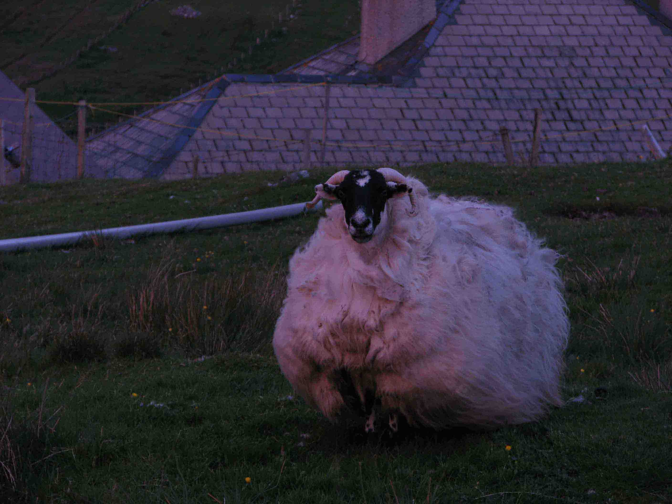 Isle of Lewis jellemző háziállata, a juh (Anglia)